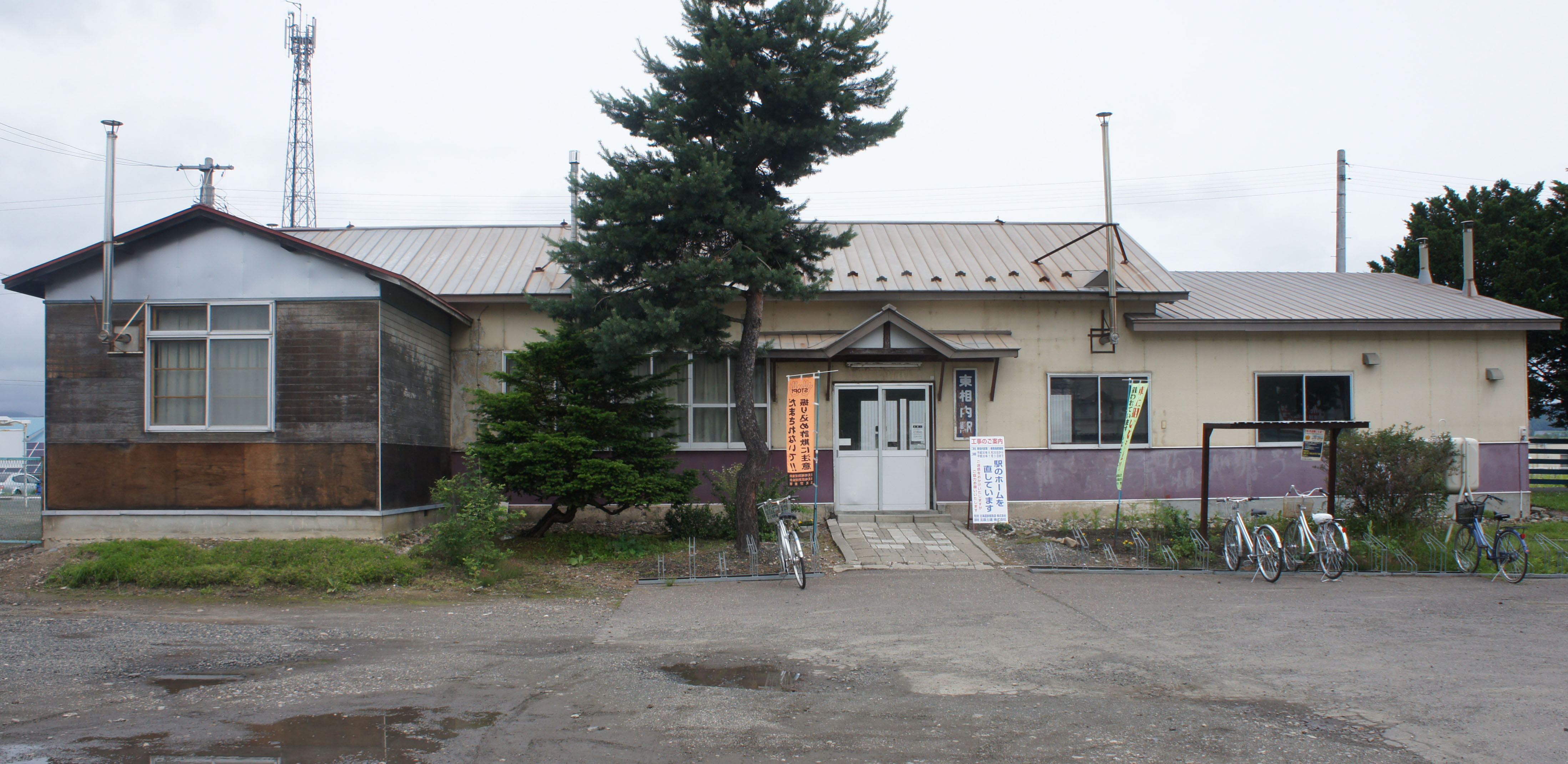 JR石北本線・東相内駅の駅舎